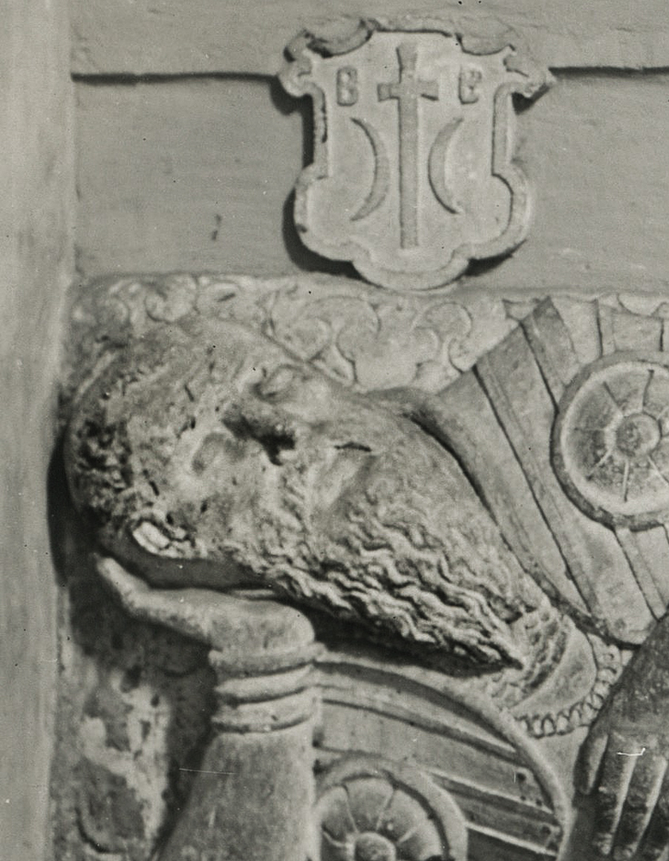 Fragment nagrobka Baltazara Bzowskiego z katedry Wniebowzięcia NMP we Lwowie, fotografia z 1912 roku autorstwa Józefa Kościesza-Jaworskiego